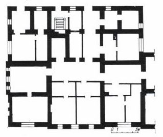 БДСГА. Таксатарскі корпус. План першага паверха.